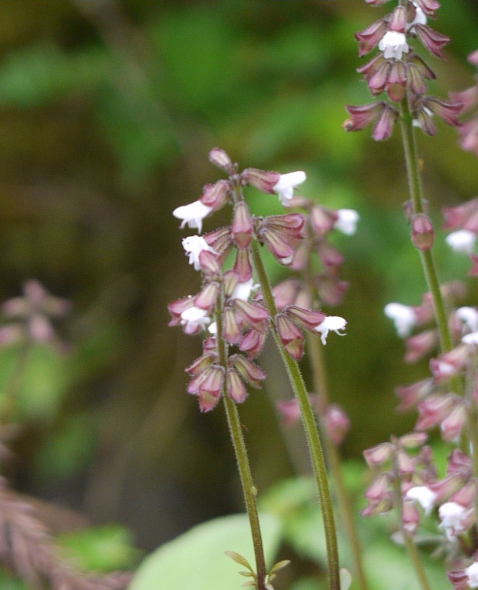 Salvia ranzaniana：ハルノタムラソウ 2010/05/15 和歌山県田辺市：Tanabe City. Wakayama Pref. Japan